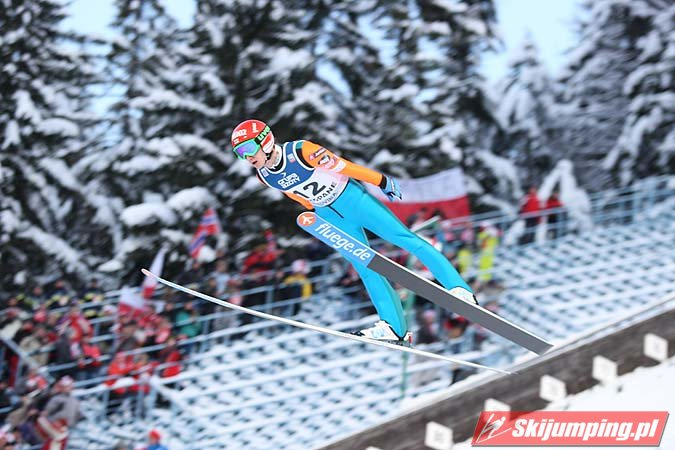 Puchar Świata w Zakopanem 2012/2013 – konkurs indywidualny (12 stycznia 2013)